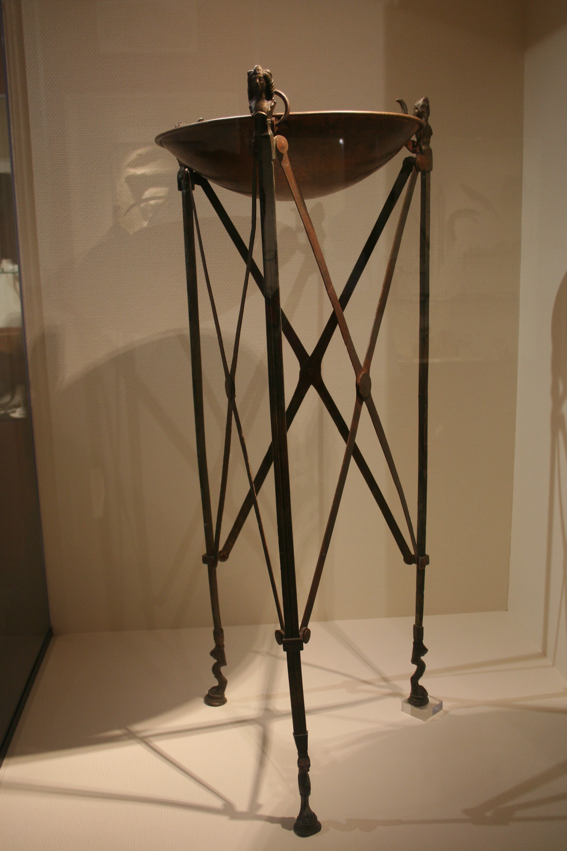 Athénienne, Musée de Normandie, Caen, France.